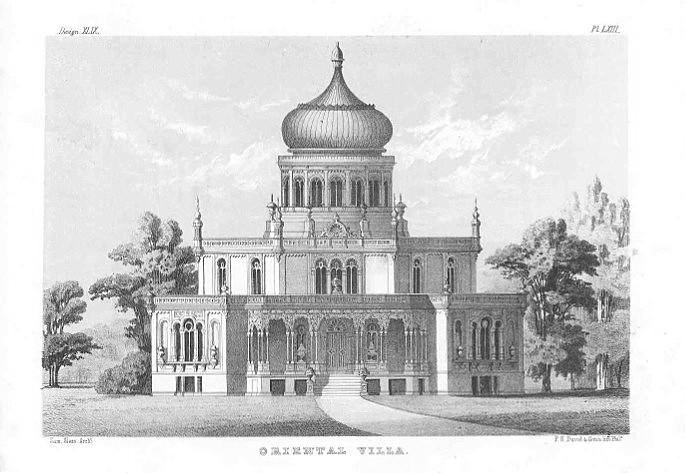 “Oriental Villa” Design:XLIX (49), Plate:LXIII (63)